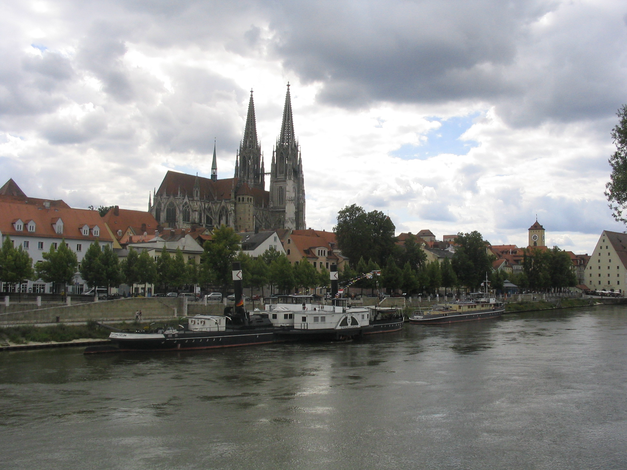 Dom in Regensburg. Aufgenommen am 30.07.2007 von Dr. Hagen Graebner